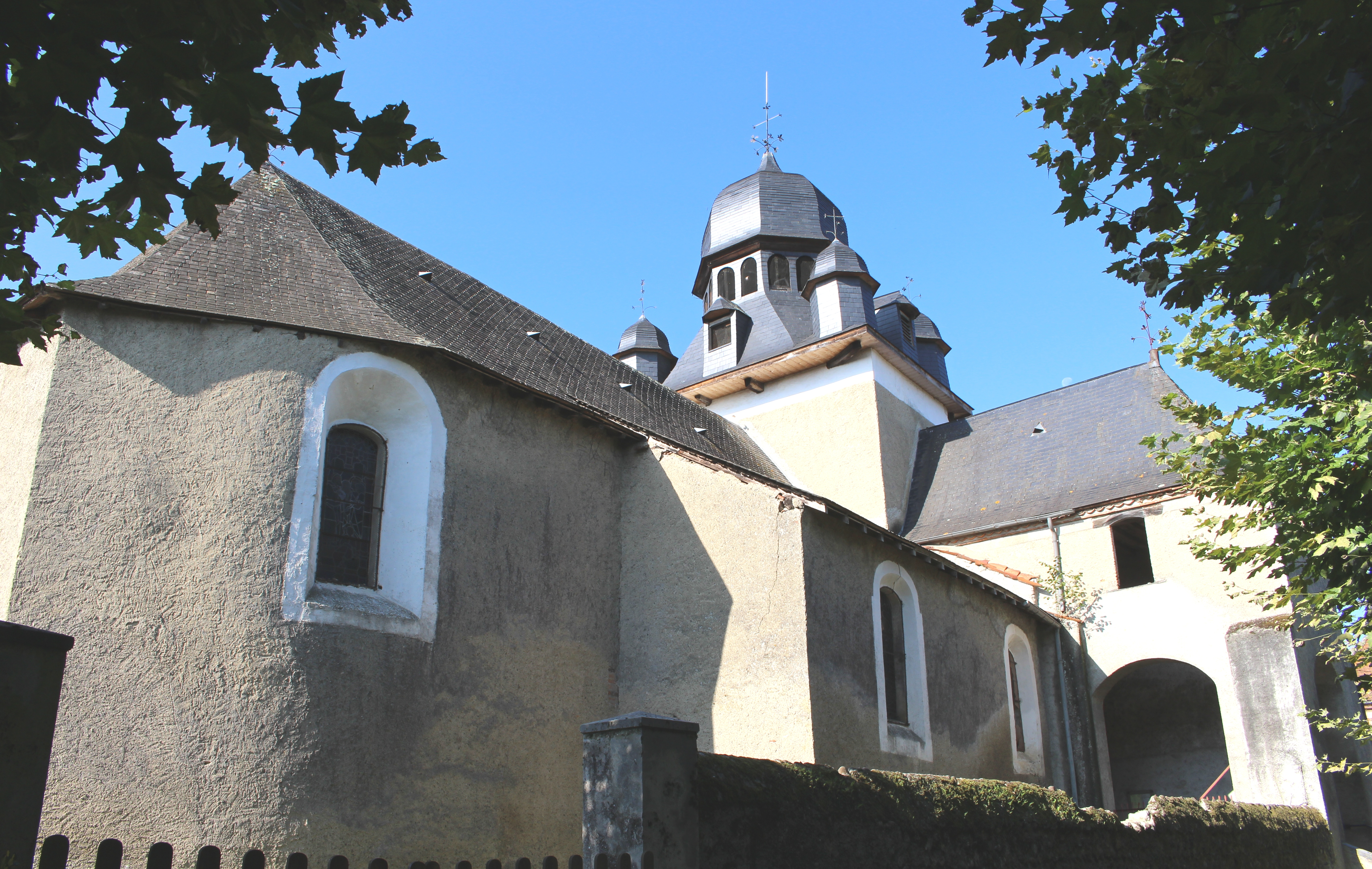 Église de l'Assomption de Caixon (Hautes-Pyrénées)